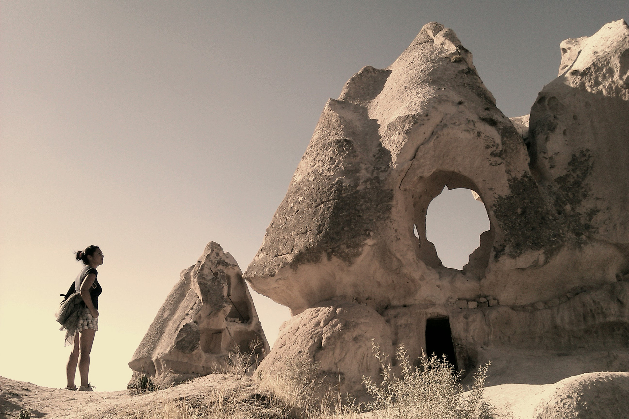 500px provided description: Uçhisar [#mobile ,#turquia ,#viajes ,#capadocia]